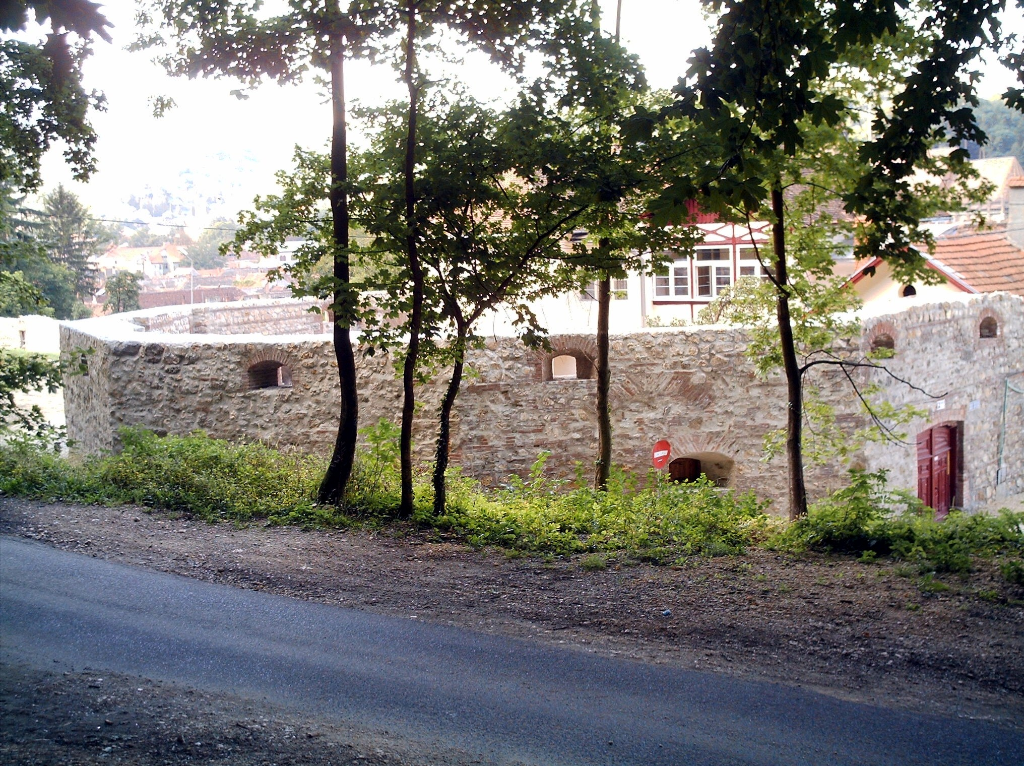 Bastionul Funarilor din Brașov